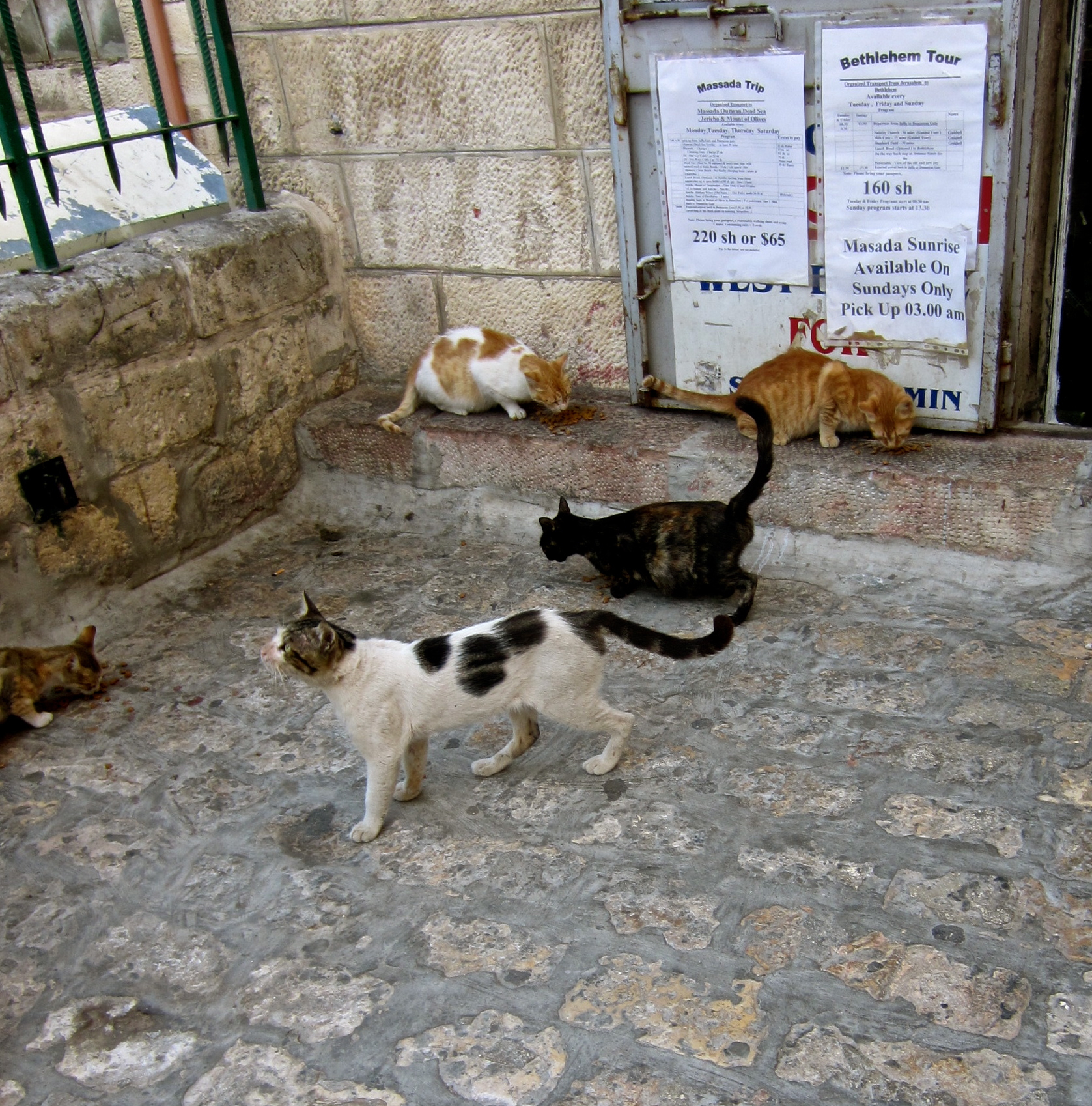 Cats cats cats Jerusalem